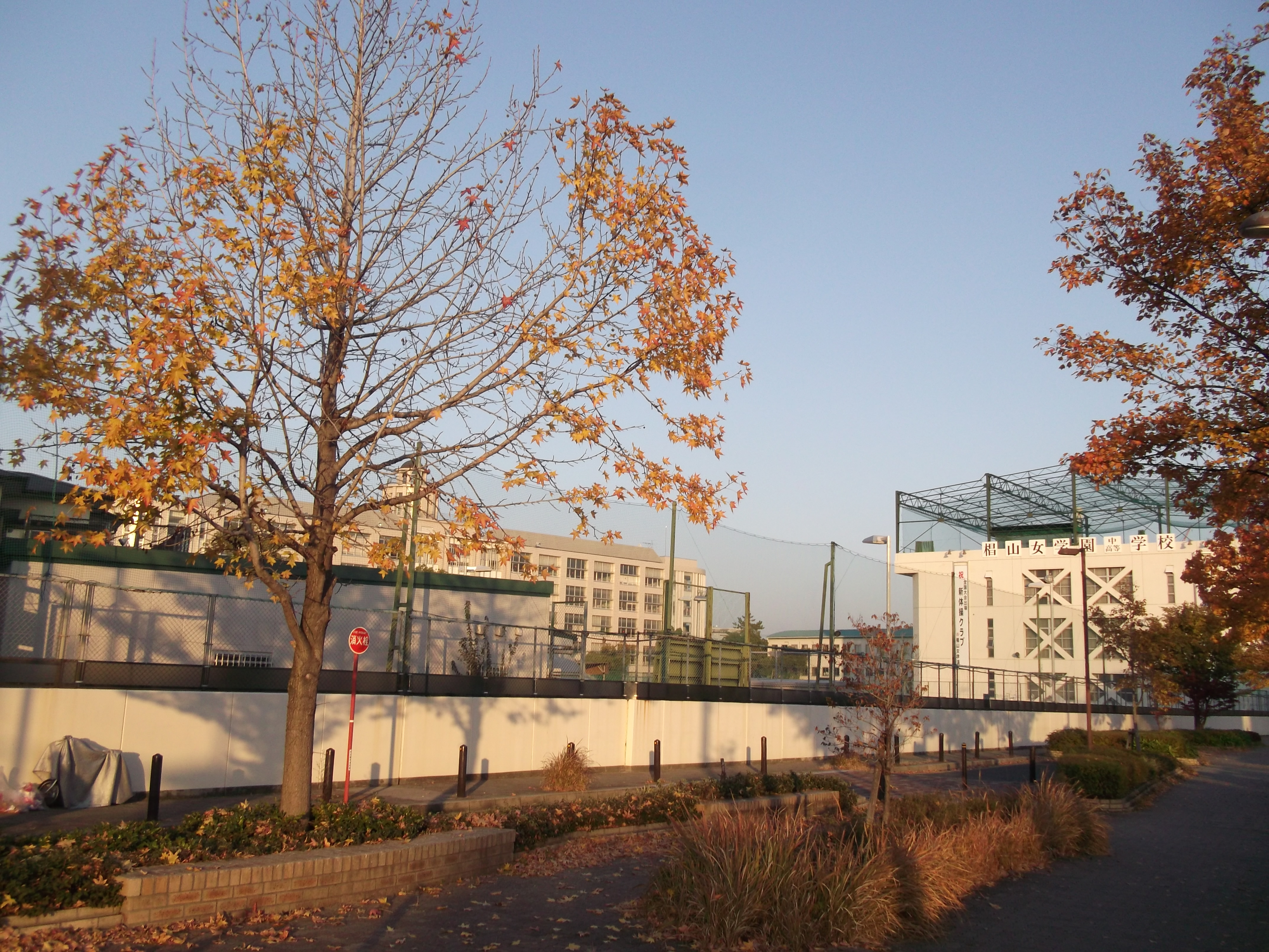 名古屋市千種区の椙山女学園中学校・高等学校を南西側から写す